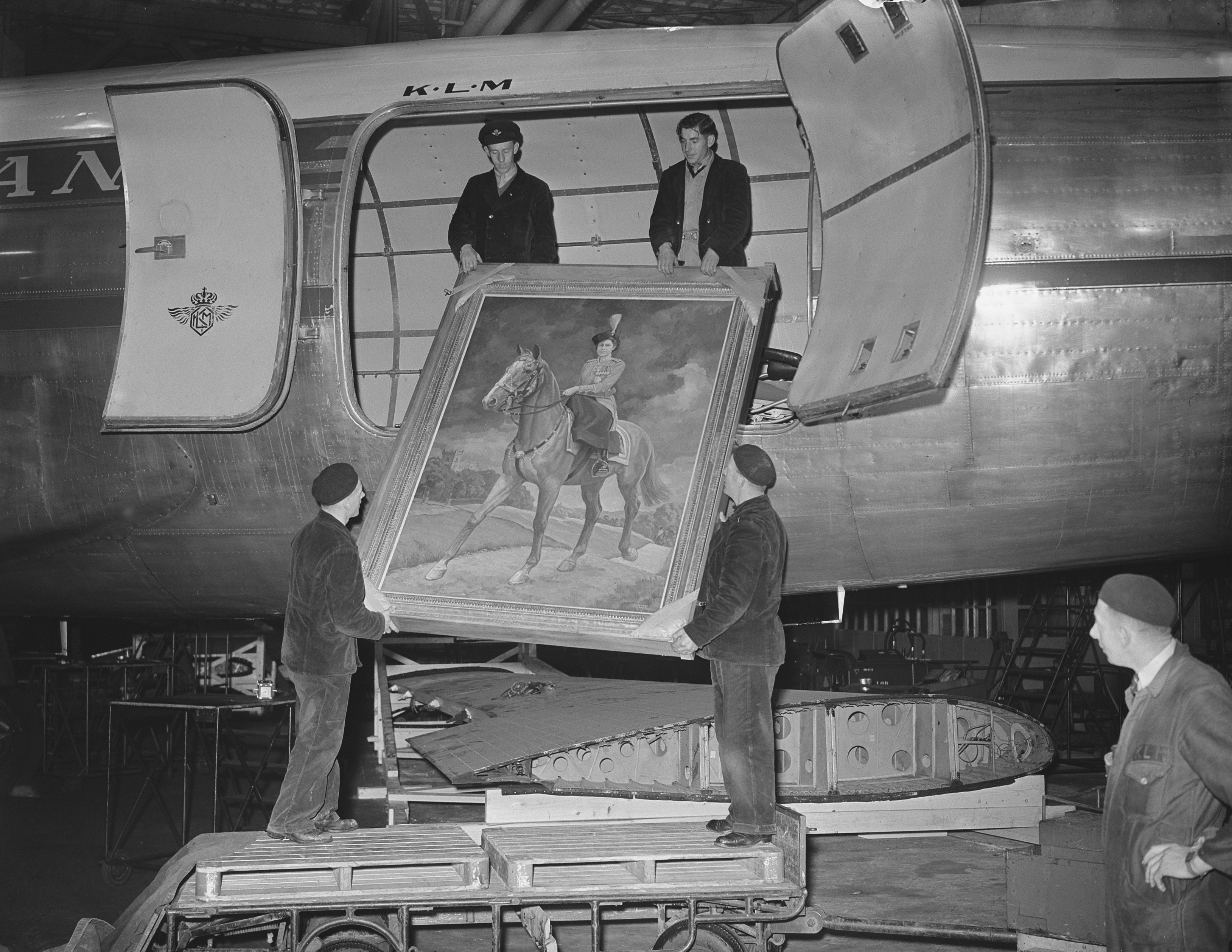 Collectie / Archief : Fotocollectie Anefo Reportage / Serie : [ onbekend ] Beschrijving : Schilderij v. Prinses Elisabeth vertrek van Schiphol Datum : 27 oktober 1952 Trefwoorden : VERTREK, schilderijen Persoonsnaam : ELISABETH PRINSES Fotograaf : Bilsen, Joop van / Anefo Auteursrechthebbende : Nationaal Archief Materiaalsoort : Glasnegatief Nummer archiefinventaris : bekijk toegang 2.24.01.09 Bestanddeelnummer : 905-3853